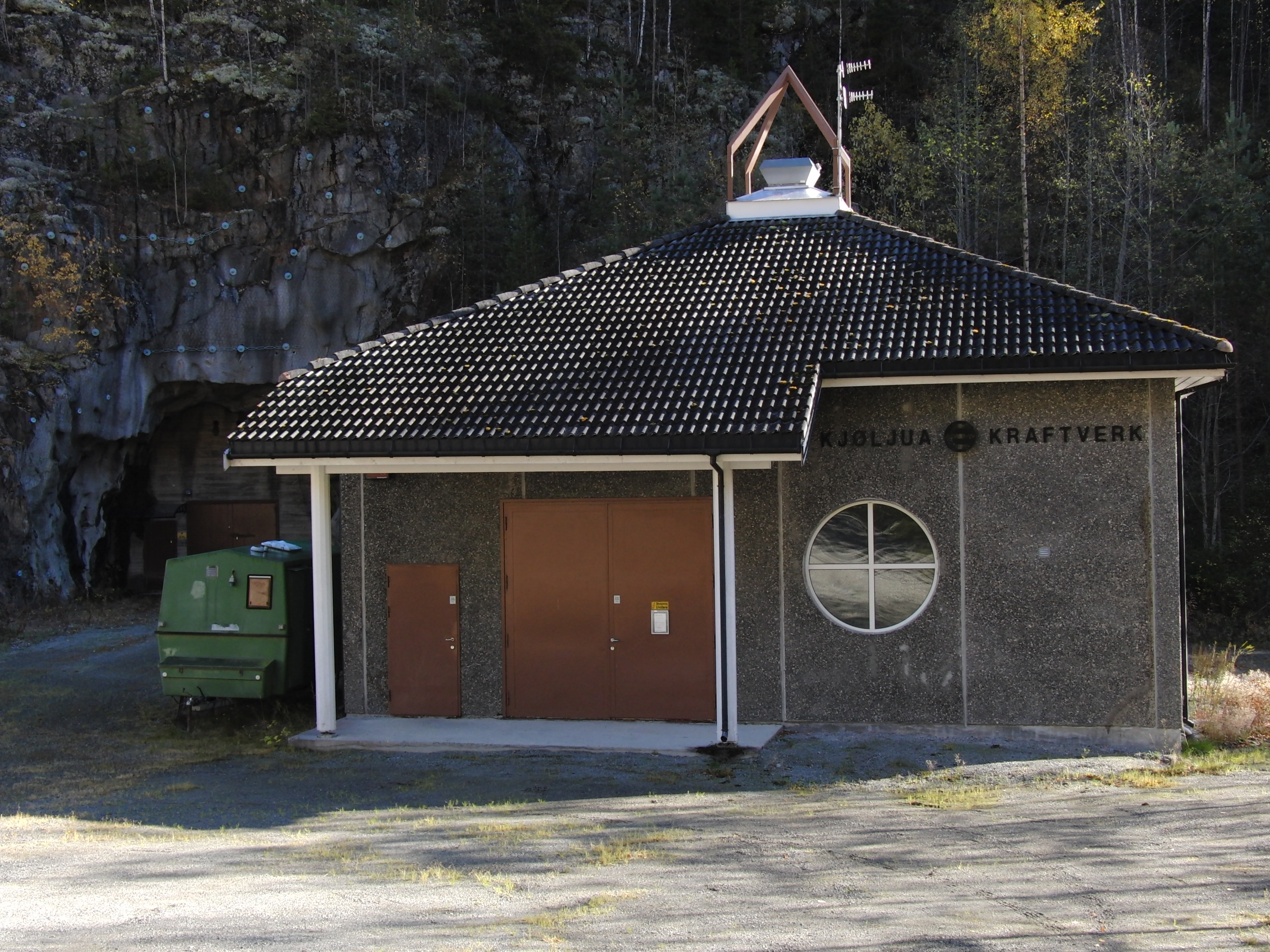 Kjøljua kraftverk